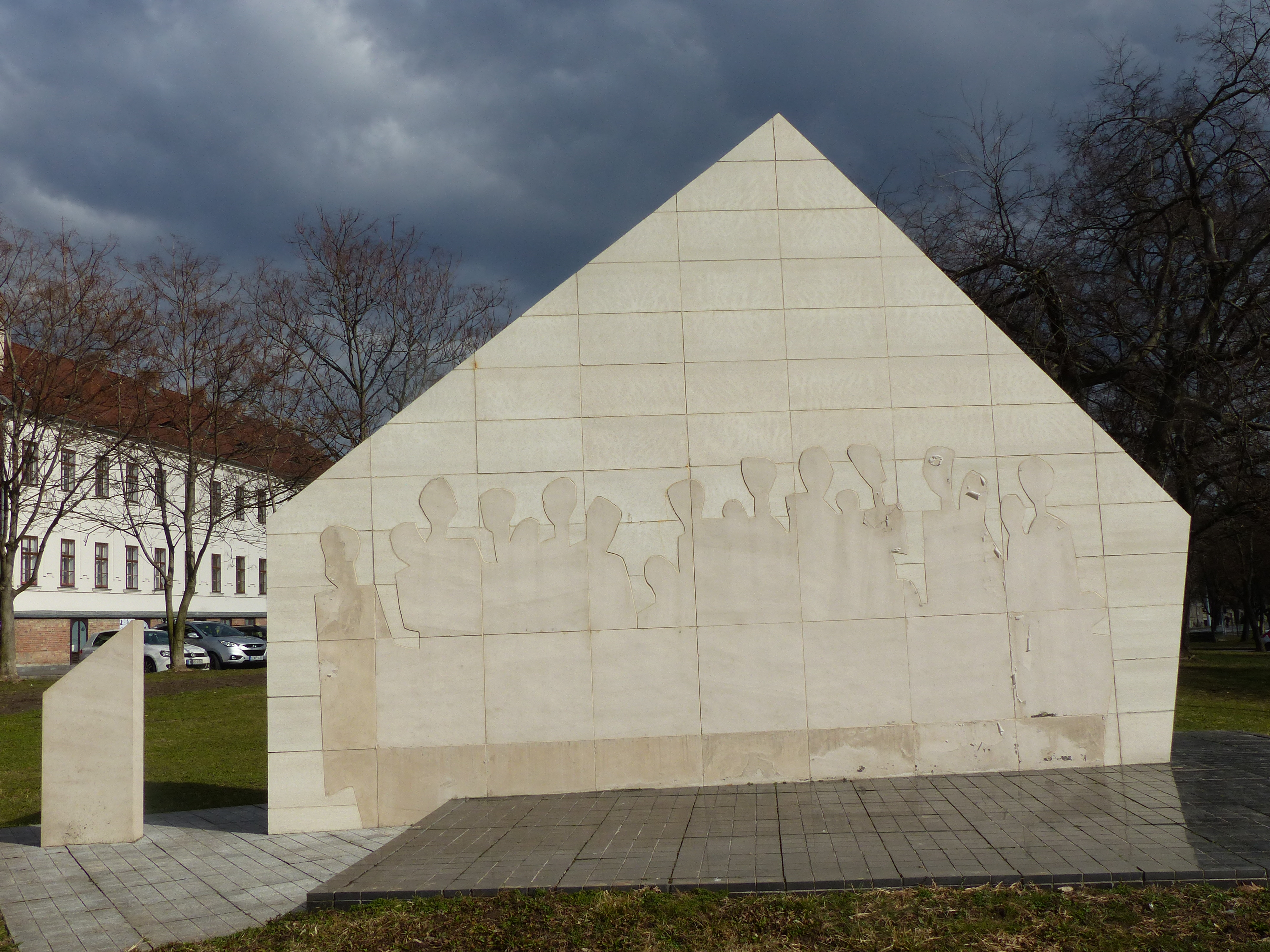 Kitelepítettek emlékműve. Hortobágy. Tabán, Buda. Közép Európa.